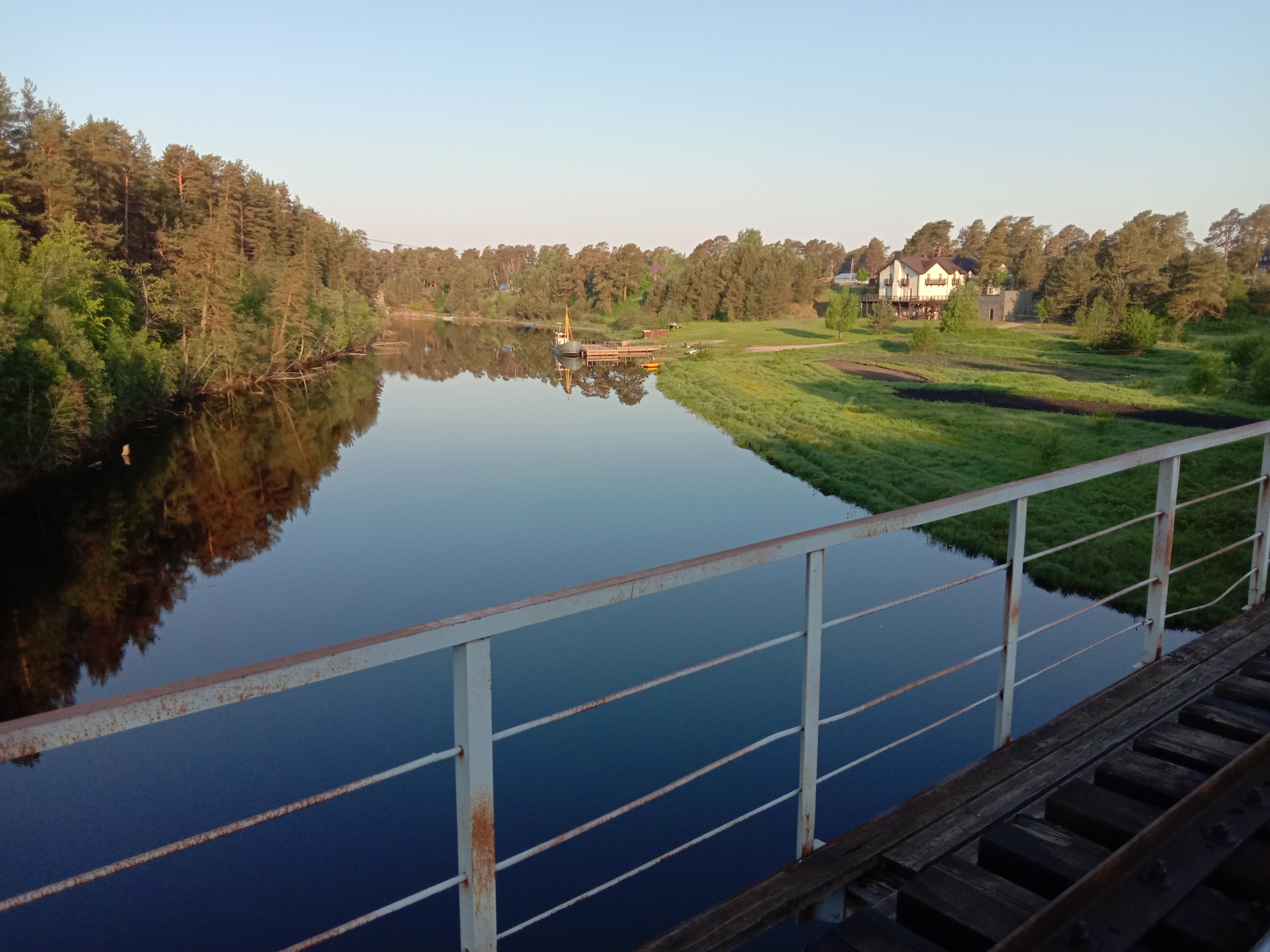 Видлица